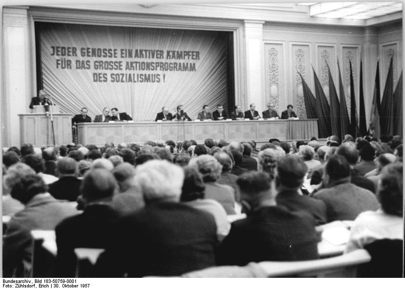 Zentralbild Zühlsdorf-Vgt-Qu. 30.10.1957 - Parteiaktivtagung der Bezirksleitung Berlin der SED - Am 30.10.1957 fand im großen Lektionssaal der Parteihochschule, Berlin Rungestrasse, eine Bezirksparteiaktivtagung der SED statt. Gen. Kuhn, 2. Sekretär der Bezirksleitung der SED Groß Berlins, sprach über die Aufgaben der Berliner Parteiorganisation nach der 33. Tagung des ZK der SED. UBz.: Blick in den Lektionssaal während der Ausführungen von Willi Kuhn. [Positiv in G IV a CDU 1955 bis 59]